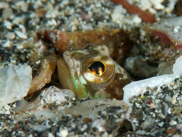 ニラミアマダイ Opistognathus iyonis